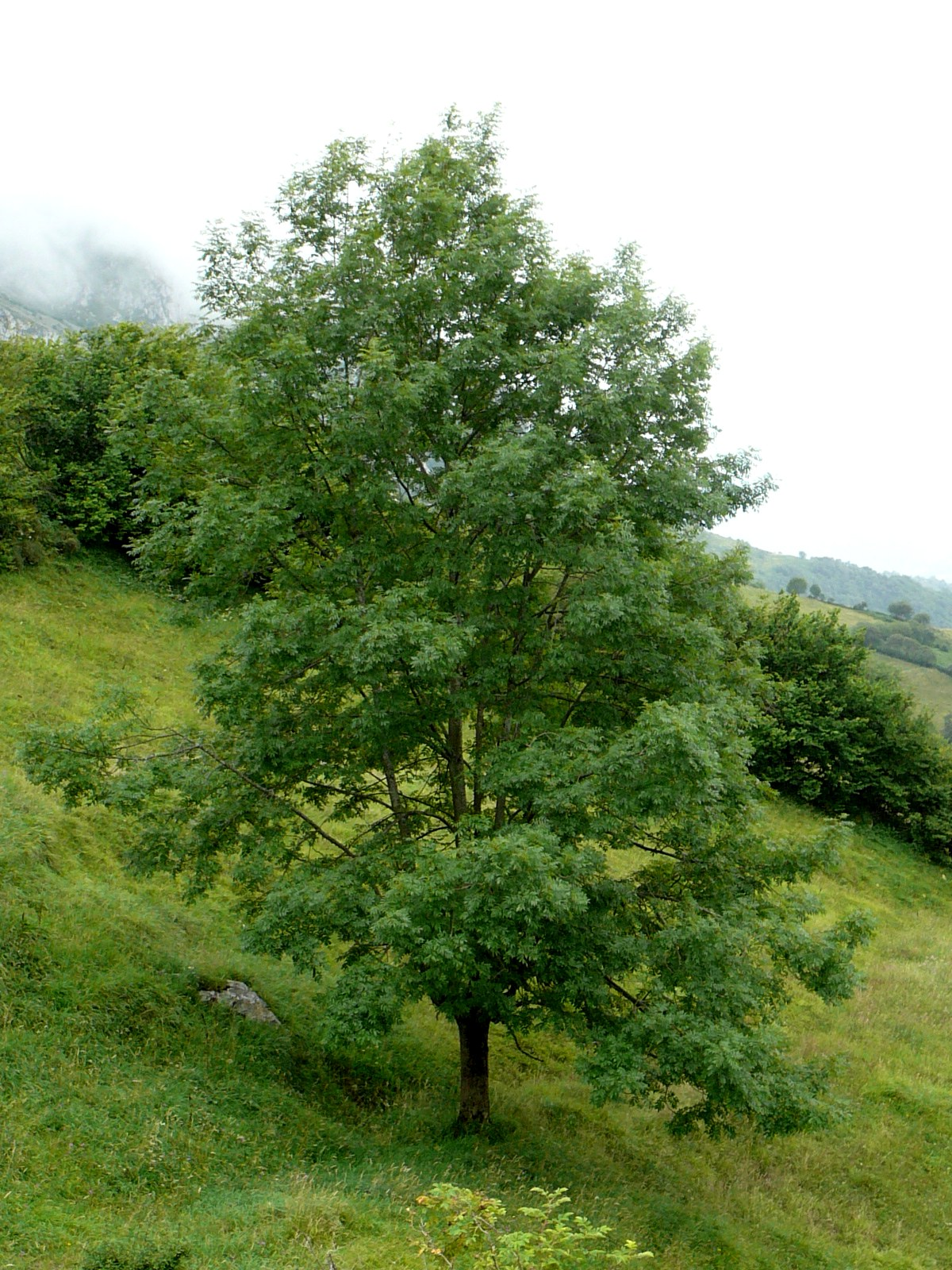 Fresno común (Fraxinus excelsior). Bermiego, Asturias.